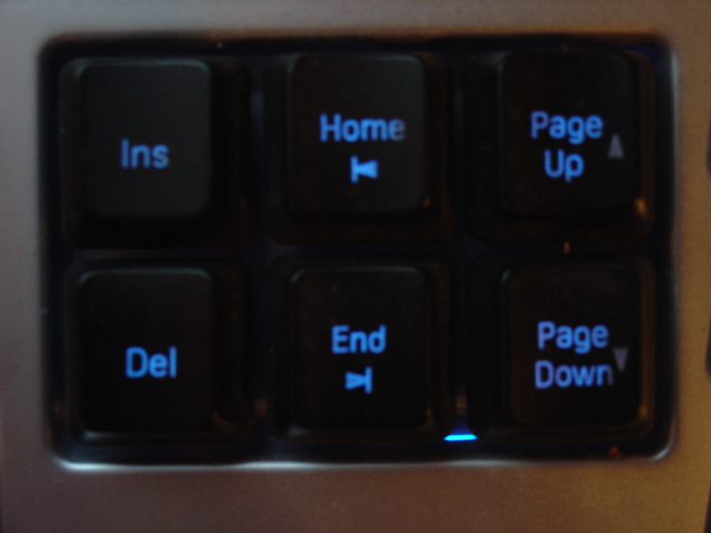 Klawisze do artykułu Home (Klawisz)